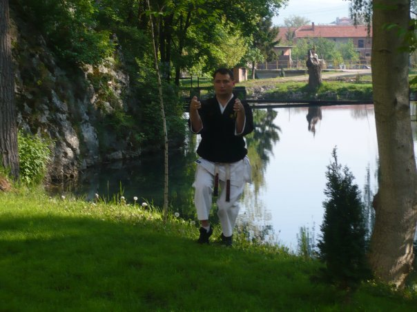 Profesor Dalibor Topić na seminaru u žagubici